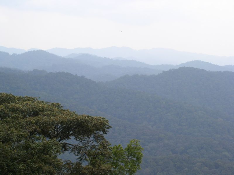 Bwindi mountains, UgandaBwindi mountains